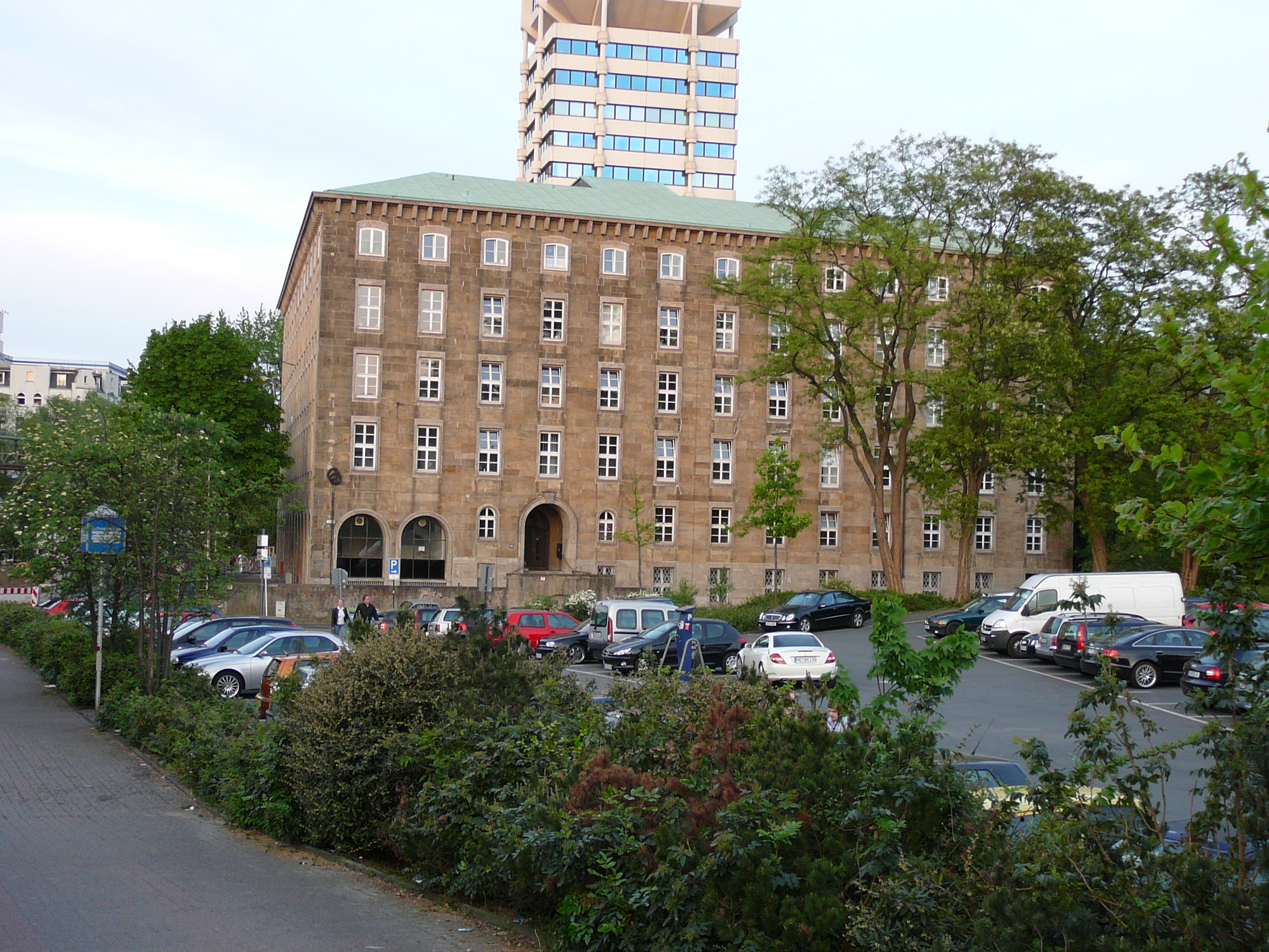 Alexanderstraße, Wuppertal